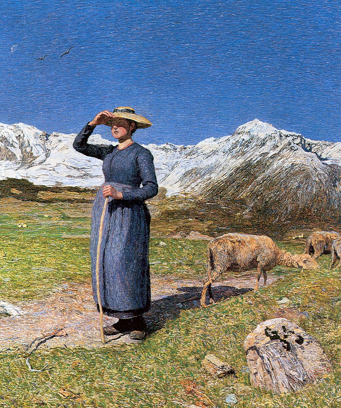 Mittag in den Alpen, 1891, 77.5x71.5cm, Segantini Museum, St. Moritz